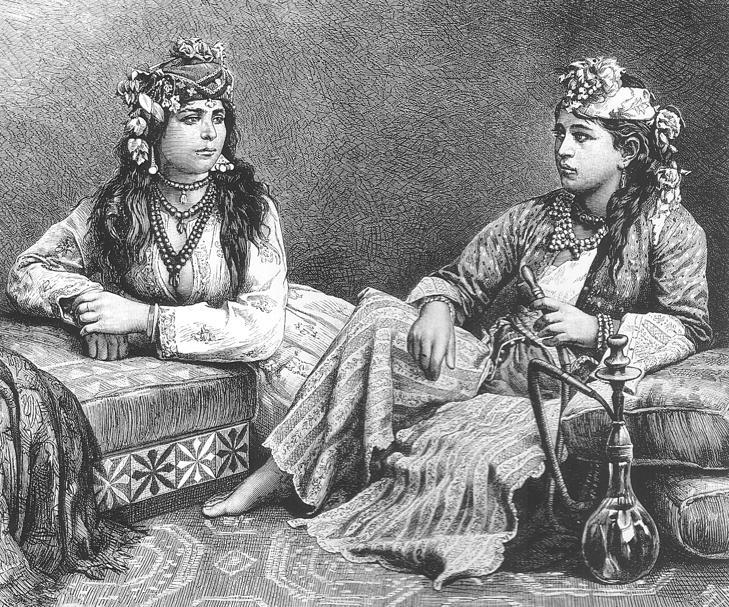 Muslim women in Sidon